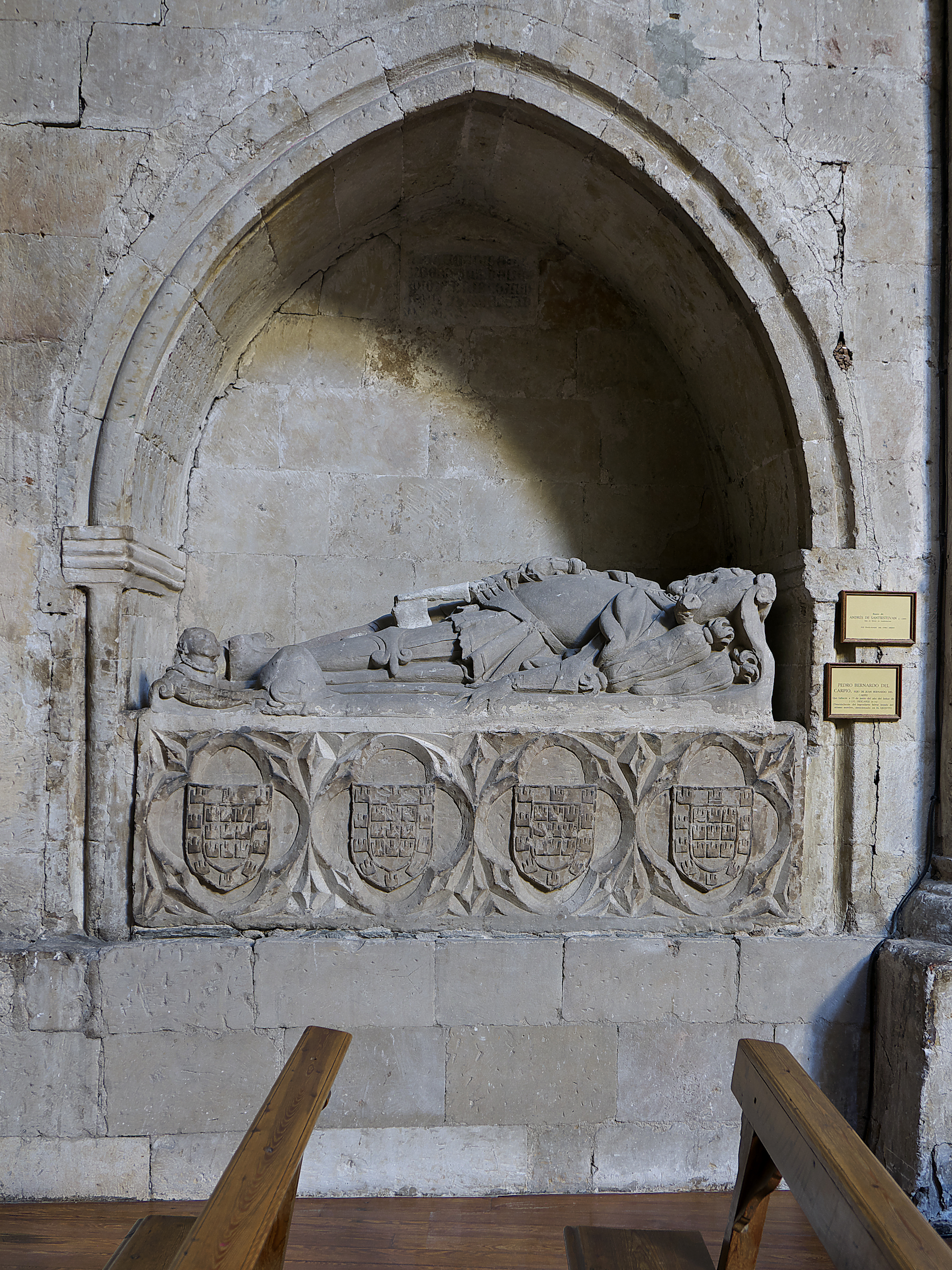 Sepulcro de Pedro Bernardo del Carpio (1135), hijo del legendario Bernardo del Carpio.